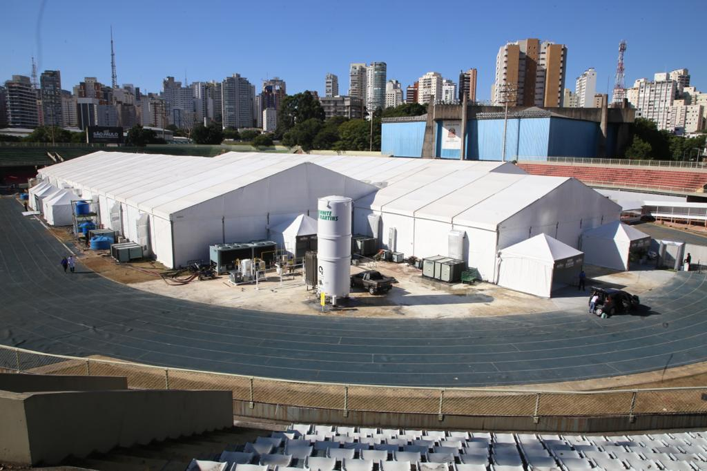 Governador do Estado de São Paulo, João Doria, durante Visita ao Hospital de Campanha - Ginásio do Ibirapuera com o prefeito Bruno Covas Local: São Paulo\SP. Data: 29\04\2020 Foto: Governo do Estado de São Paulo